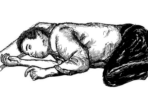 Zotavovacia (stabilizovaná) poloha na boku udržuje voľné dýchacie cesty a bráni prípadnému vdýchnutiu obsahu ústnej dutiny